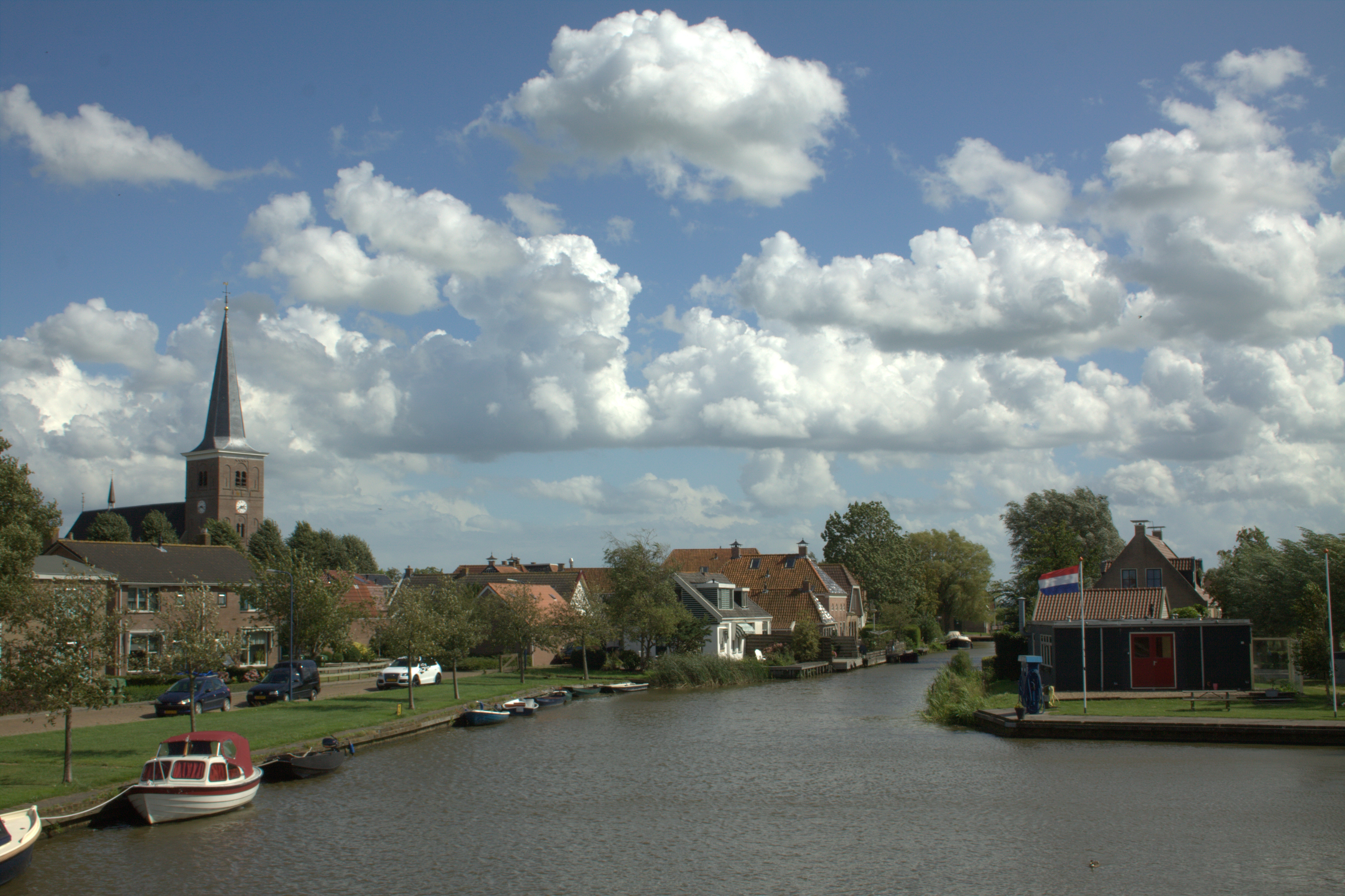 Easterlittens in Friesland in de gemeente Littenseradiel